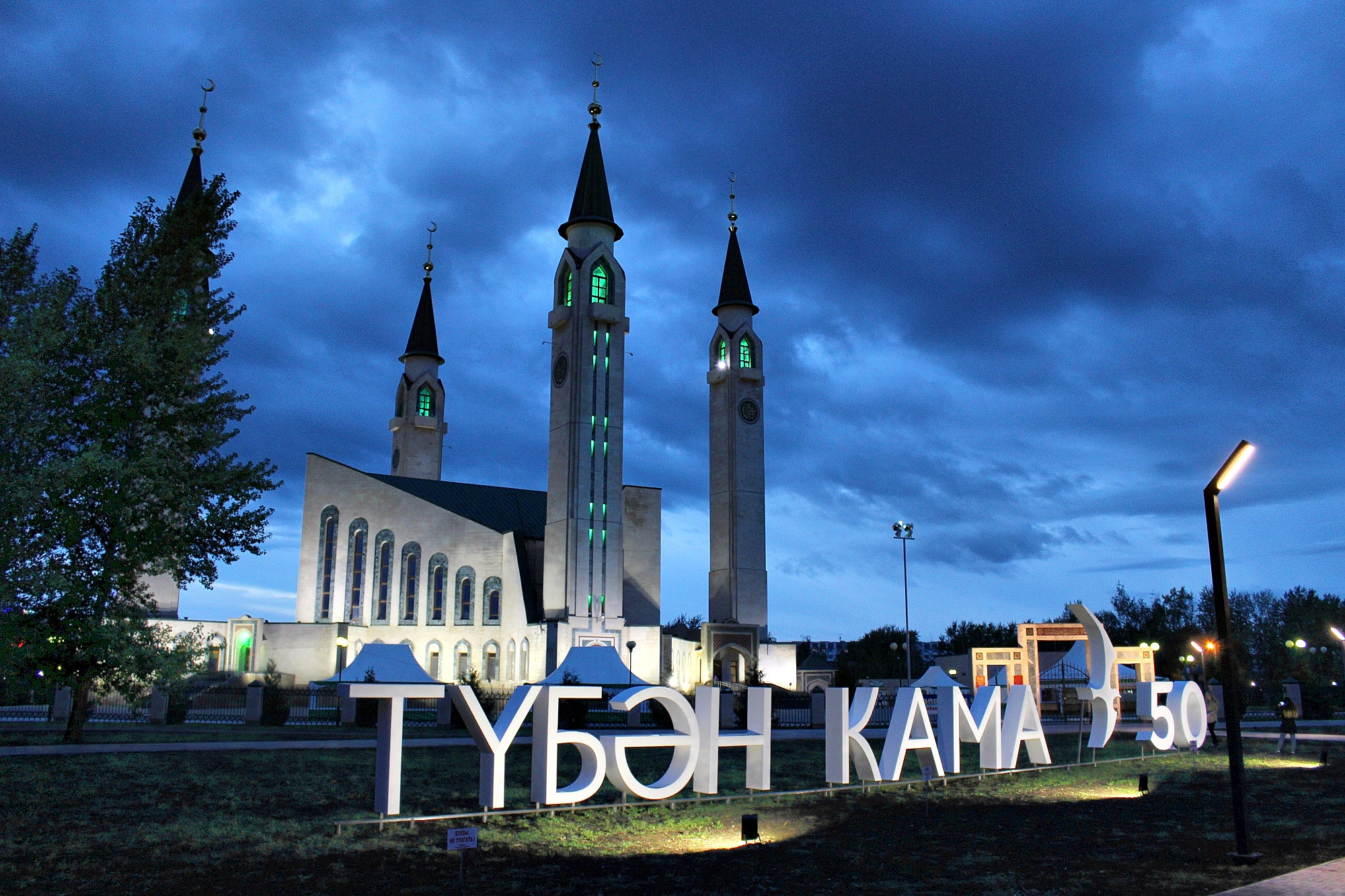 Tübenkama Camii - Нижнекамская соборная мечеть - Түбән Кама шәһәре җәмигъ мәчете - Tübən Kama şəhəre cәmiğ məçete